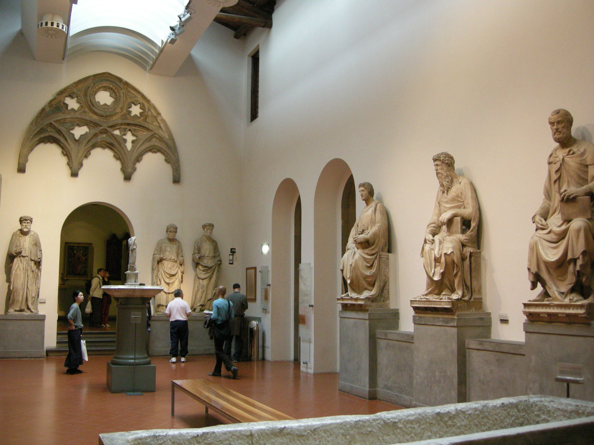 Sala dell'antica facciata